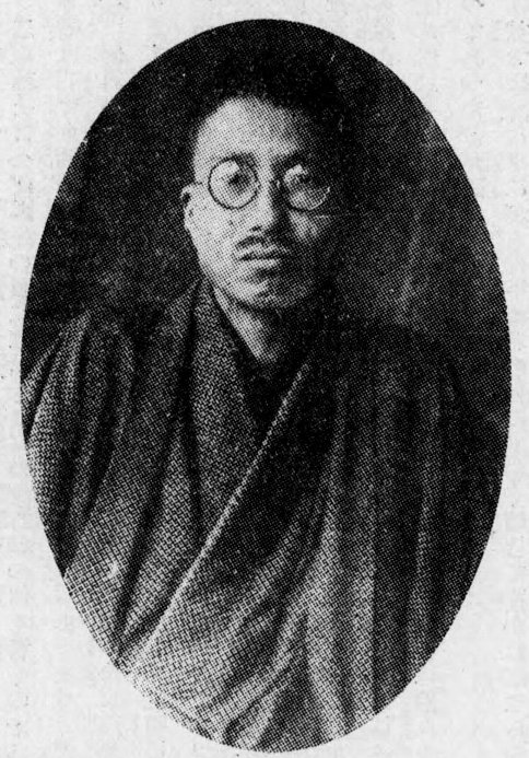 尾佐竹猛（1880-1946）